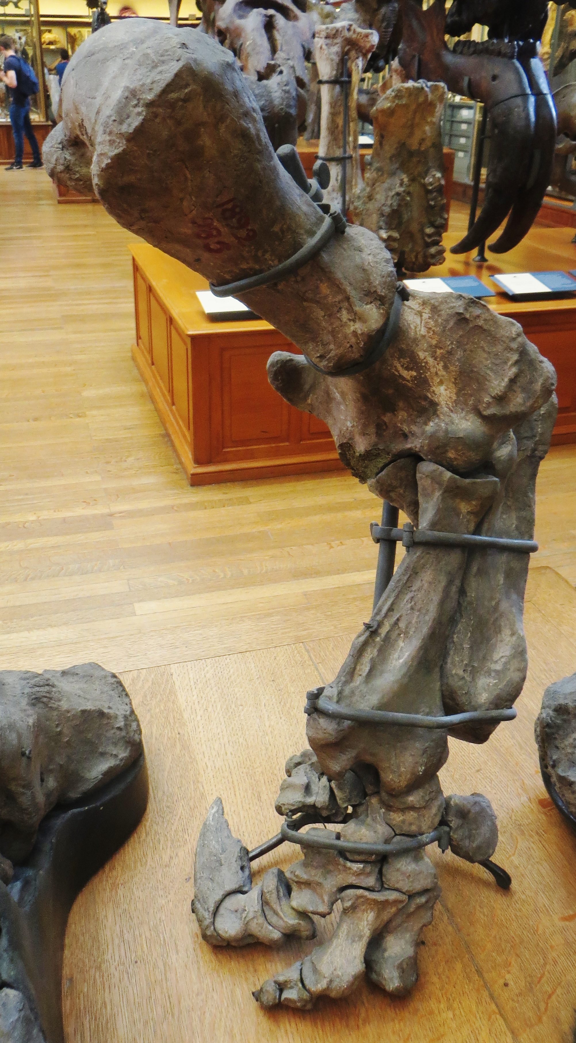 Mylodon fossil